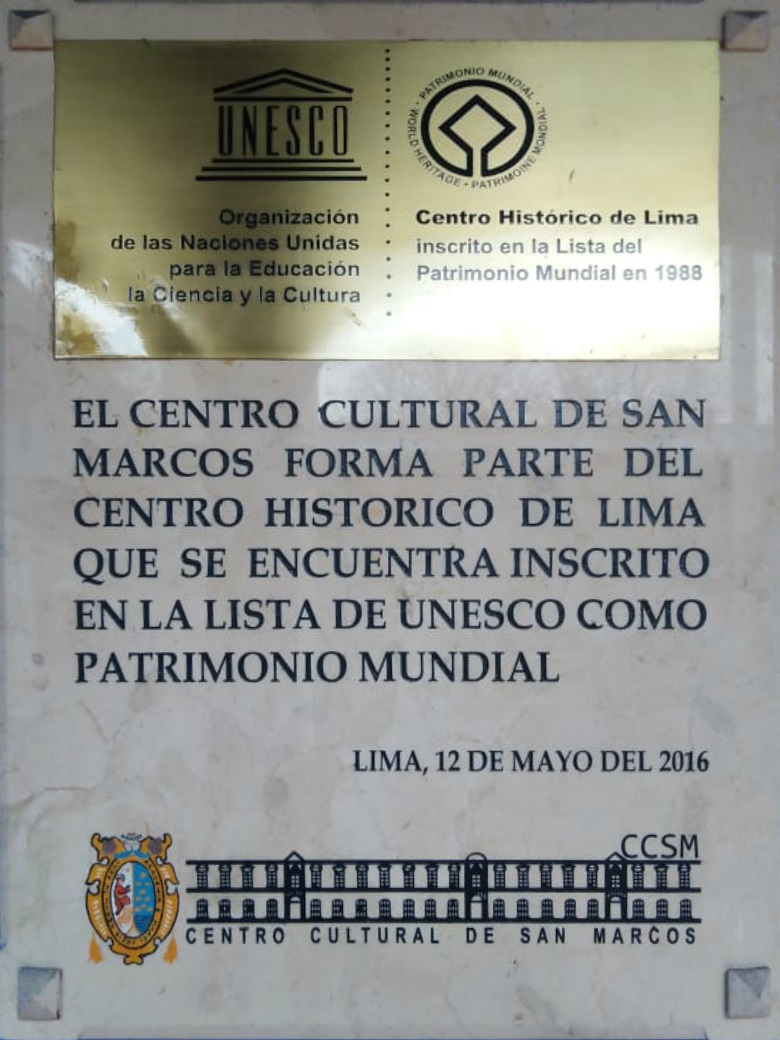 UNMSM-CCSM Casona de la Universidad de San Marcos